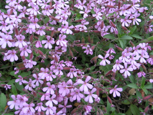 Saponaria ocymoides from Aguilar de Campoó, Palencia